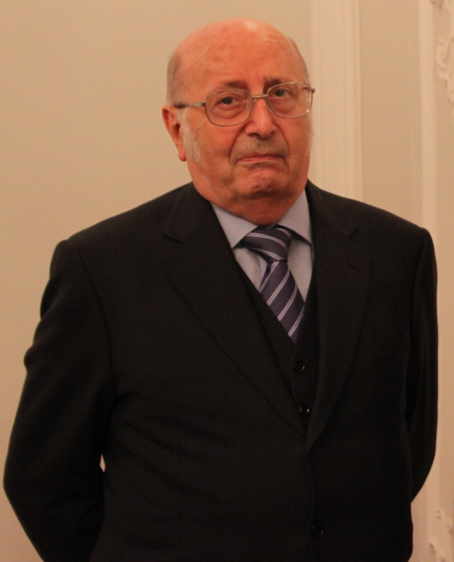 prof. Giovanni Reale